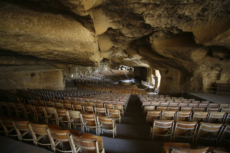 Интерьер Кафедрального собора Св. Девы Марии и Св.Симеона, Каир, Египет.